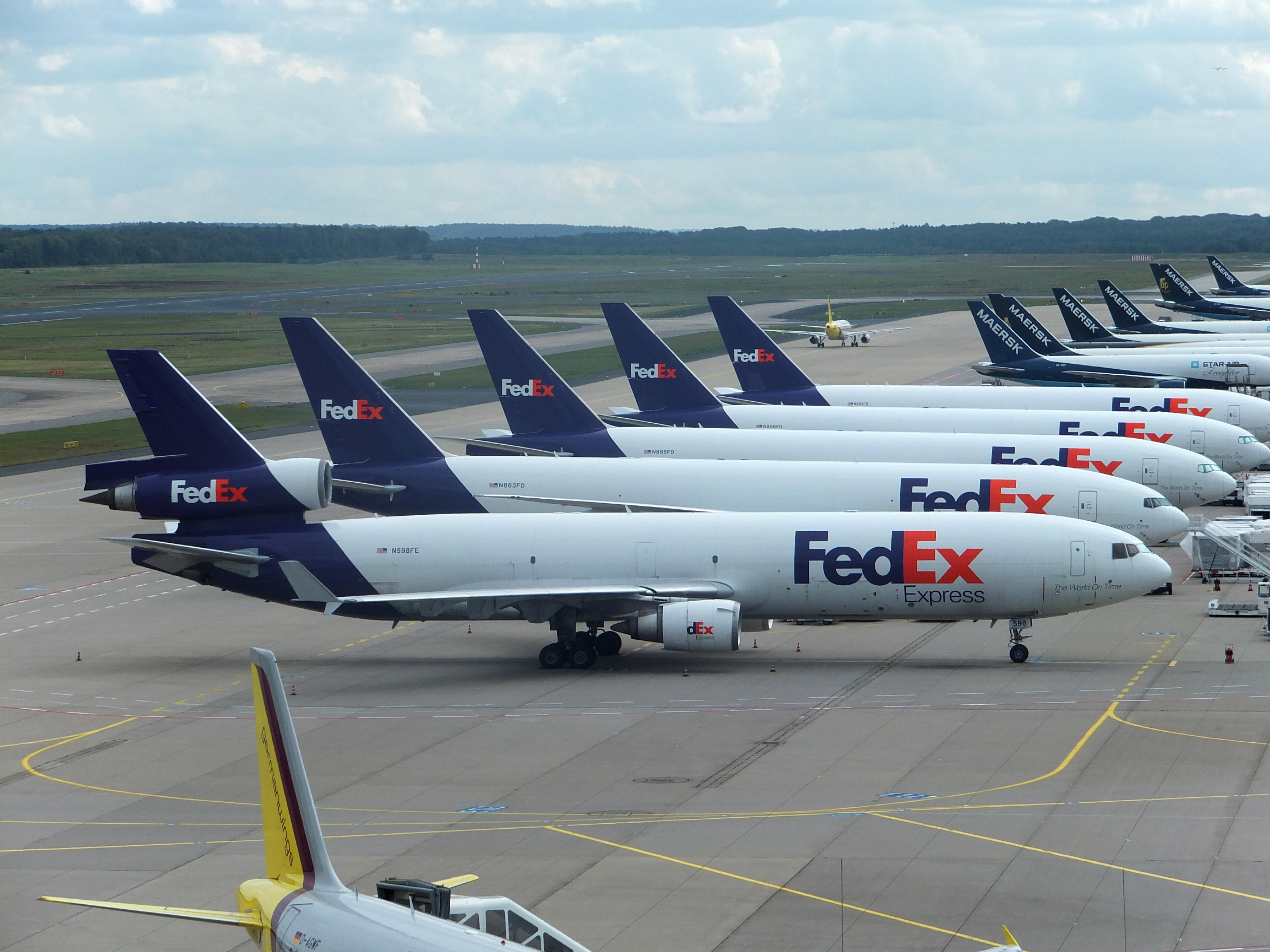 Flugzeuge am Flughafen Köln-Bonn; Cargo-Maschinen der Unternehmen FedEx und Maersk